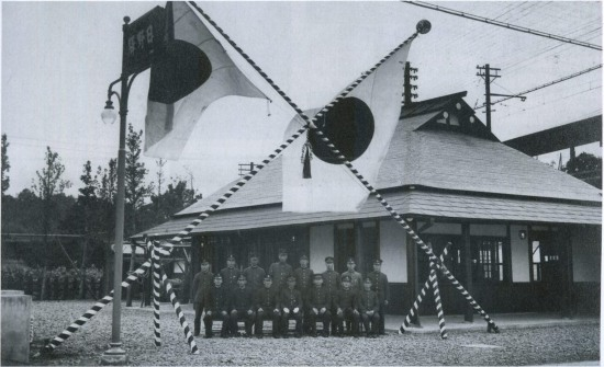 2代目日野駅開設記念 『中央線 街と駅の120年』によれば、日野市郷土資料館所蔵。日野宿発見隊「まちかど写真館 ｉｎ ひの」データベース によれば、馬場収氏所有。